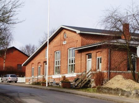 Forsamlingshuset Veddum Sal. I 1880 stiftede fremsynede og initiativrige mænd og kvinder en afholdsforening i Veddum. Foreningen købte i 1883 en udstillingsbygning i Aalborg. Bygningen, som oprindelig vor opført som træbygning på landmandsforsamlingen i Karolinelund (der hvor Tivoli ligger i dag), blev revet ned og transporteret de 42 km. til Veddum i hestevogne. Her blev den genopført som Østhimmerlands første og største forsamlingshus, der blev indviet i august 1884. Løverne, som er Veddum Sals kendetegn, blev også købt på landmandsforsamlingen, og har holdt vagt siden 1884. Salen blev frem til 1978 drevet af Veddum Afholdsforening med skiftende værter, herefter overgik den først til selvejende institution og senere foreningsejet med bestyrelsen, som den arbejdende kraft. Ud over anvendelse til familie- og årstidens fester, flæskespil, præmiewhist m.v. bruges lokalerne til aftenskole, loppemarkeder, dilettant, generalforsamlinger m.m.